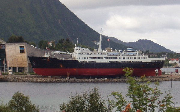 MS Finnmarken auf ihrem letzten Liegeplatz vor dem Hurtigruten-Museum in Stokmarknes.